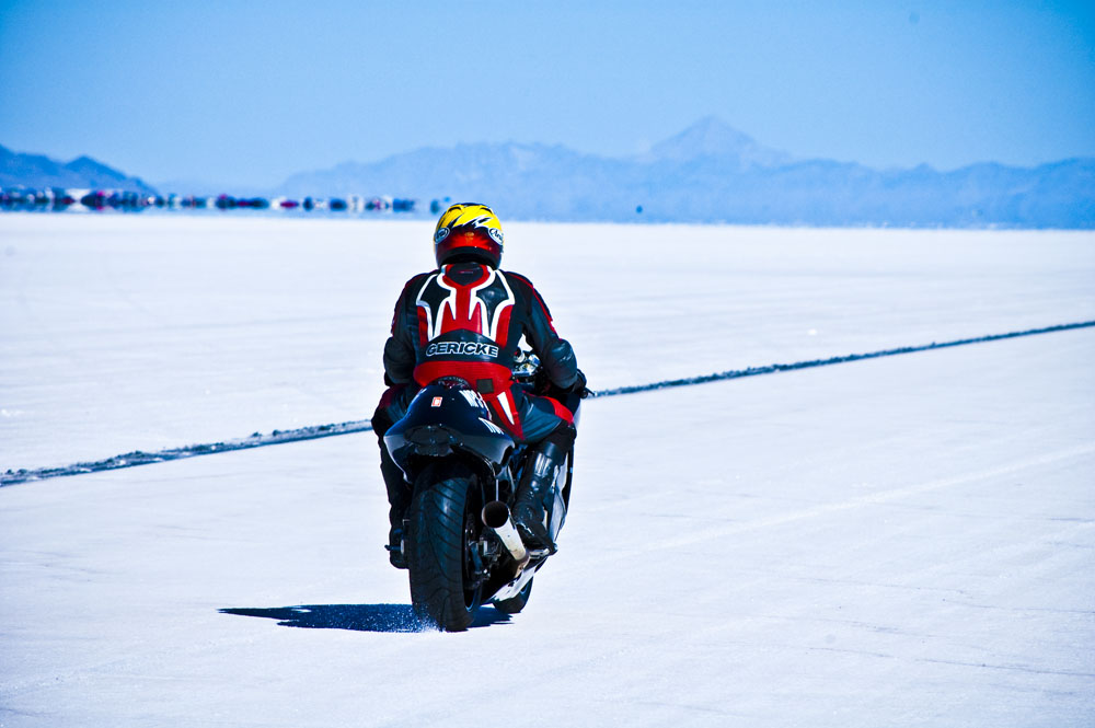 Hayabusa at Bonneville salt flats. 2009